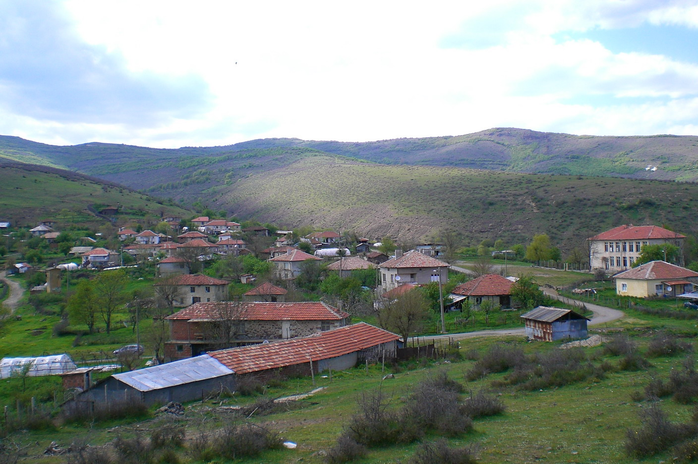 erkan_Semerdji